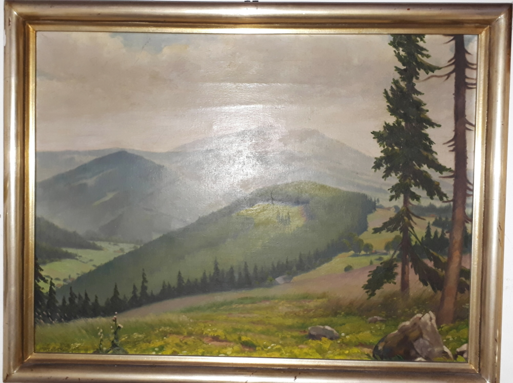 Horská krajina